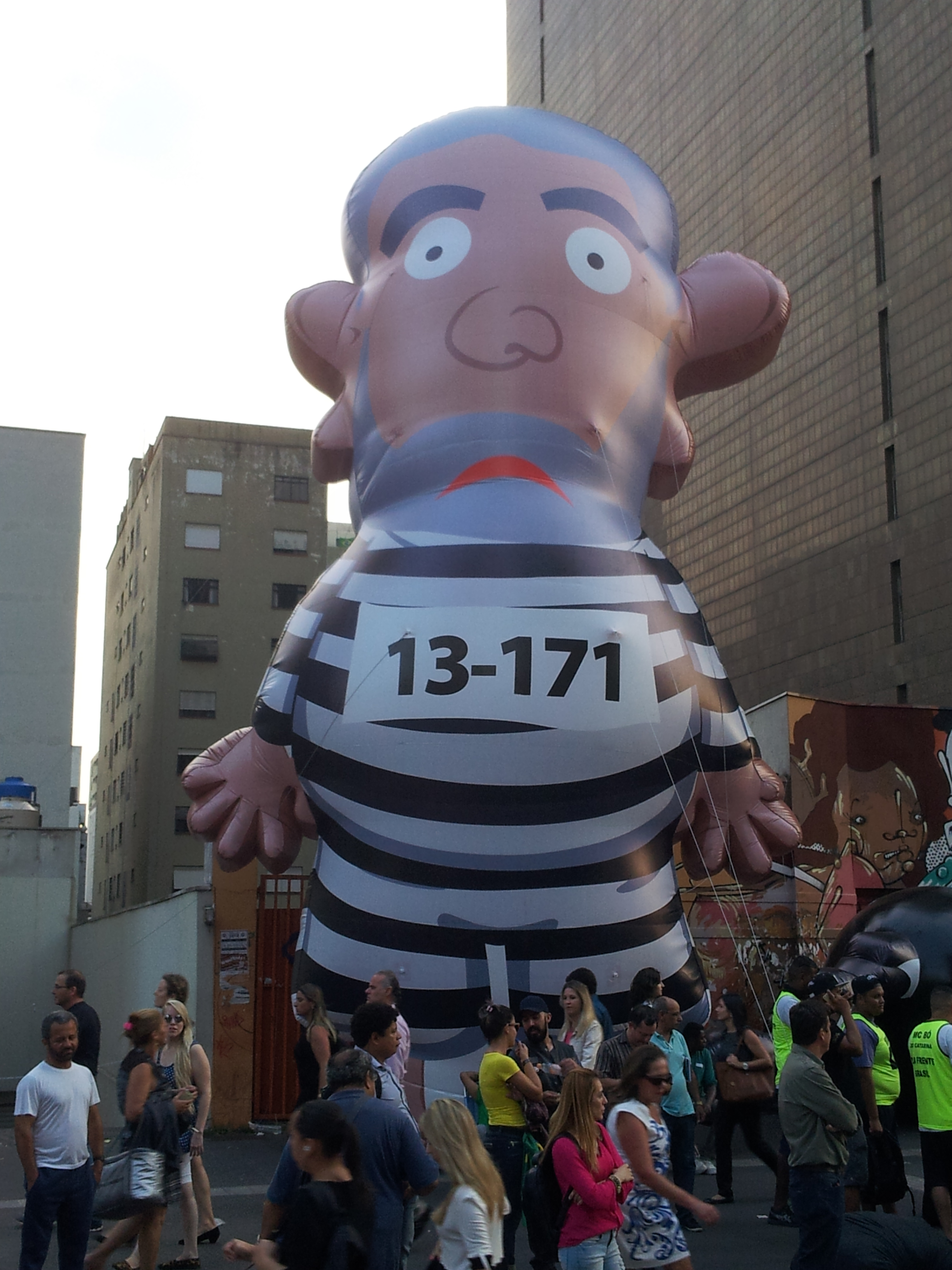 Boneco Pixuleco na Avenida Paulista em março de 2016